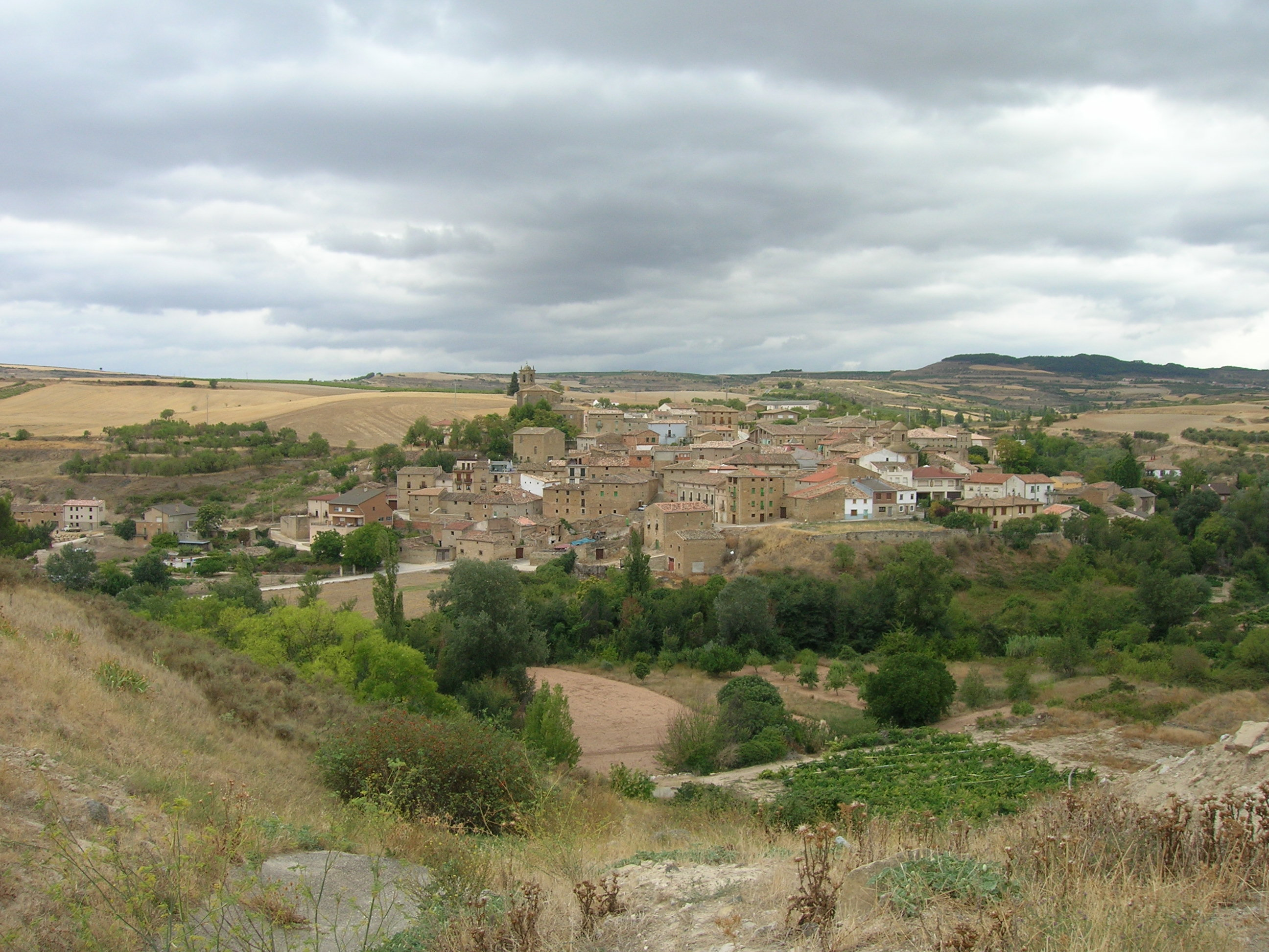 En Navarra, entre las localidades de Los Arcos y Viana, se encuentra estos dos pequeños pueblos en los que se ubica la iglesia del Santo Sepulcro, uno de los más importantes monumentos del arte románico del Camino.